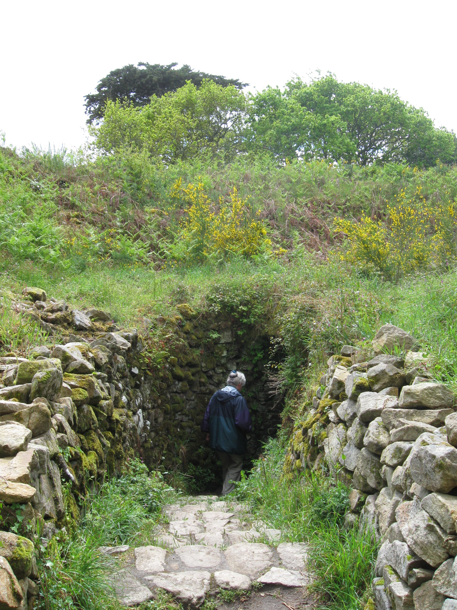 Tumulus Mane er Hroech, bei Locmariaquer, Morbihan